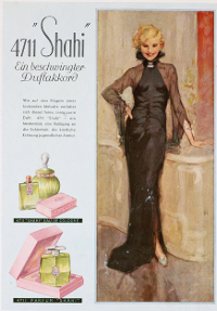 Werbeplakat 4711 Shahi, "Ein beschwingter Duftakkord, 1936